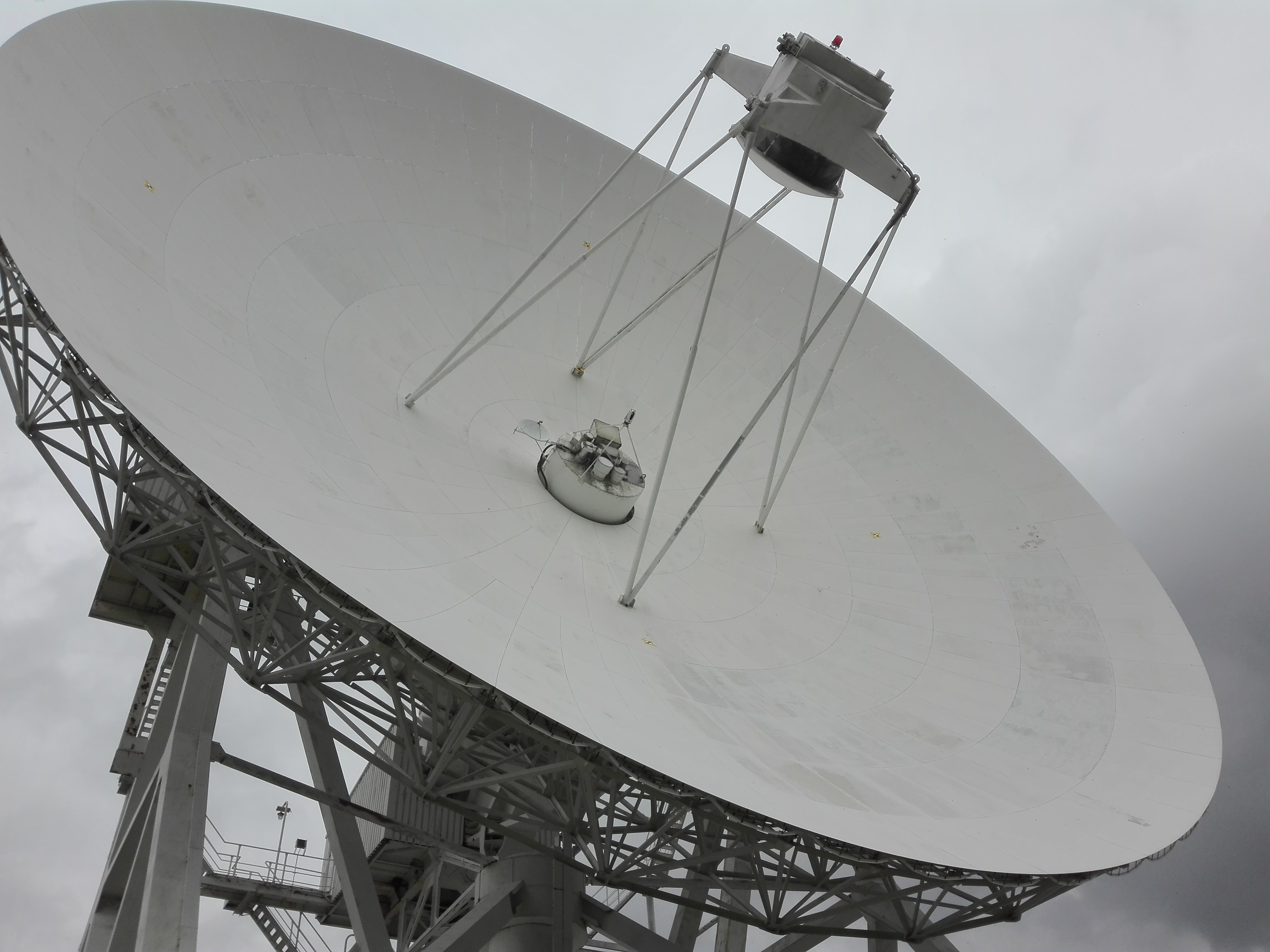 Radioteleskop Kopernik MT-4 w Piwnicach pod Toruniem - skaning laserowy z udziałem polskich firm, PG i UMK